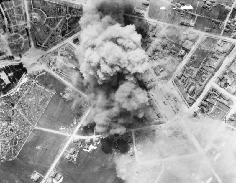 1944 Niksic bombing.